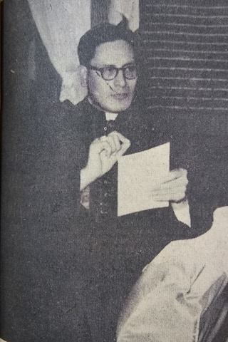 Mons. Luis Munive y Escobar (1920-2001), I Obispo de Tlaxcala